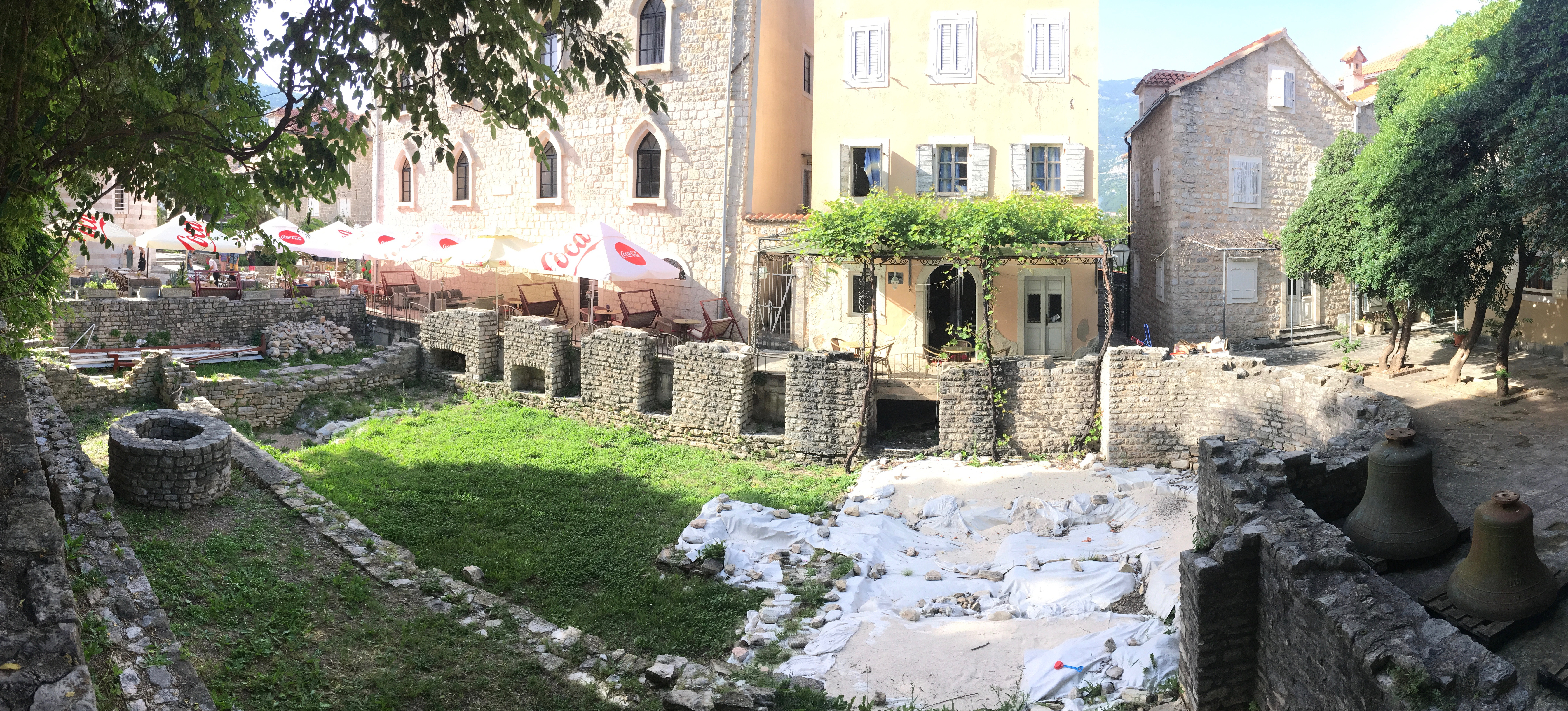 Ankstyvosios krikščionybės laikų bazilikos likučiai Budvoje (Juodkalnija), šalia citadelės.